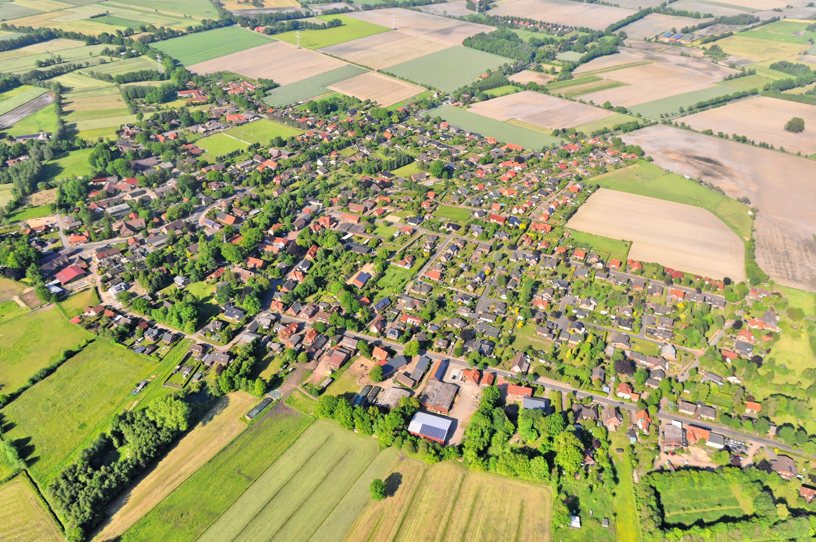 Überführungsflug vom Flugplatz Nordholz-Spieka über Lüneburg, Potsdam zum Flugplatz Schwarzheide-Schipkau